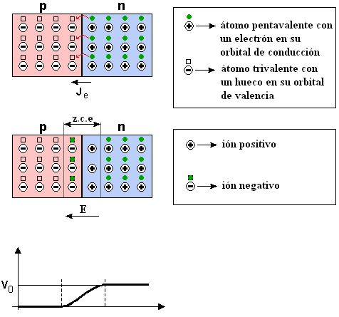 Imagen creada por Willy, (discusión) y --Biohazard910 categoría: electrónica (imagen)